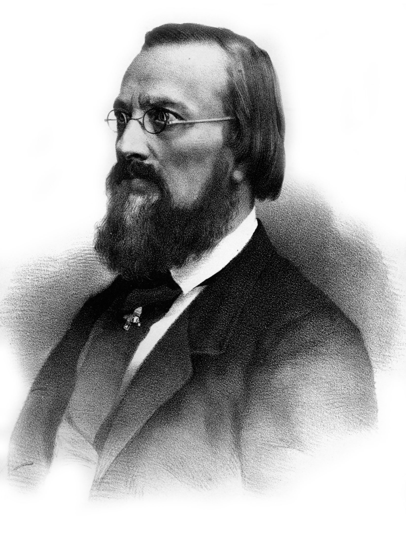 N. KOSSTOMAROW. Съ Фотогр. N.N. Лит. А. Мюнстера, СПБ. Imp. Lith. A. Munster (Editeur)